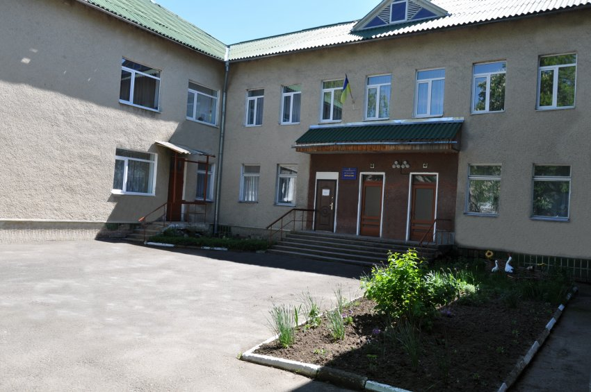 ДНЗ Журавлик